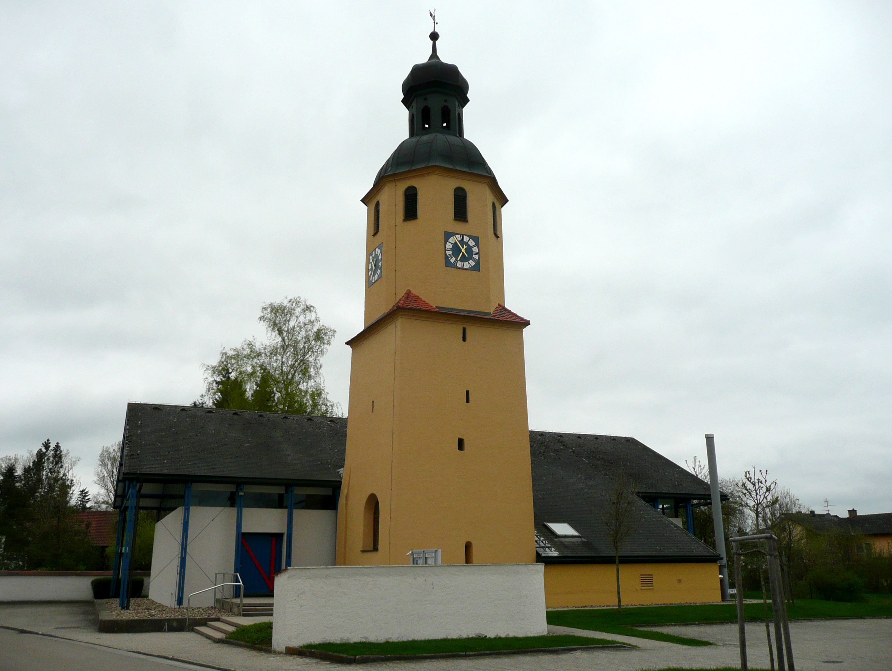 Katholische Filialkirche St. Andreas in Adelschlag. Ansicht von O. This is a photograph of an architectural monument.